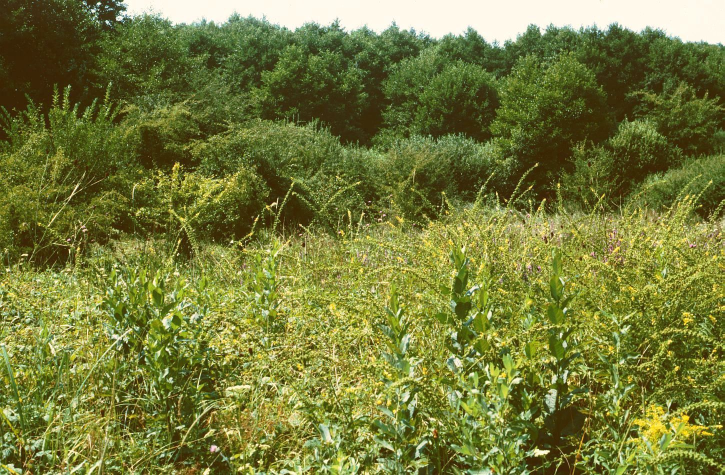 Großer Odermennig (Agrimonia procera Wallr.), Rosengewächse (Rosaceae), individuenreicher Bestand - Österreich/Austria/Autriche: Burgenland, bei Güssing, nahe beim südlichen Ufer des Fischteichs